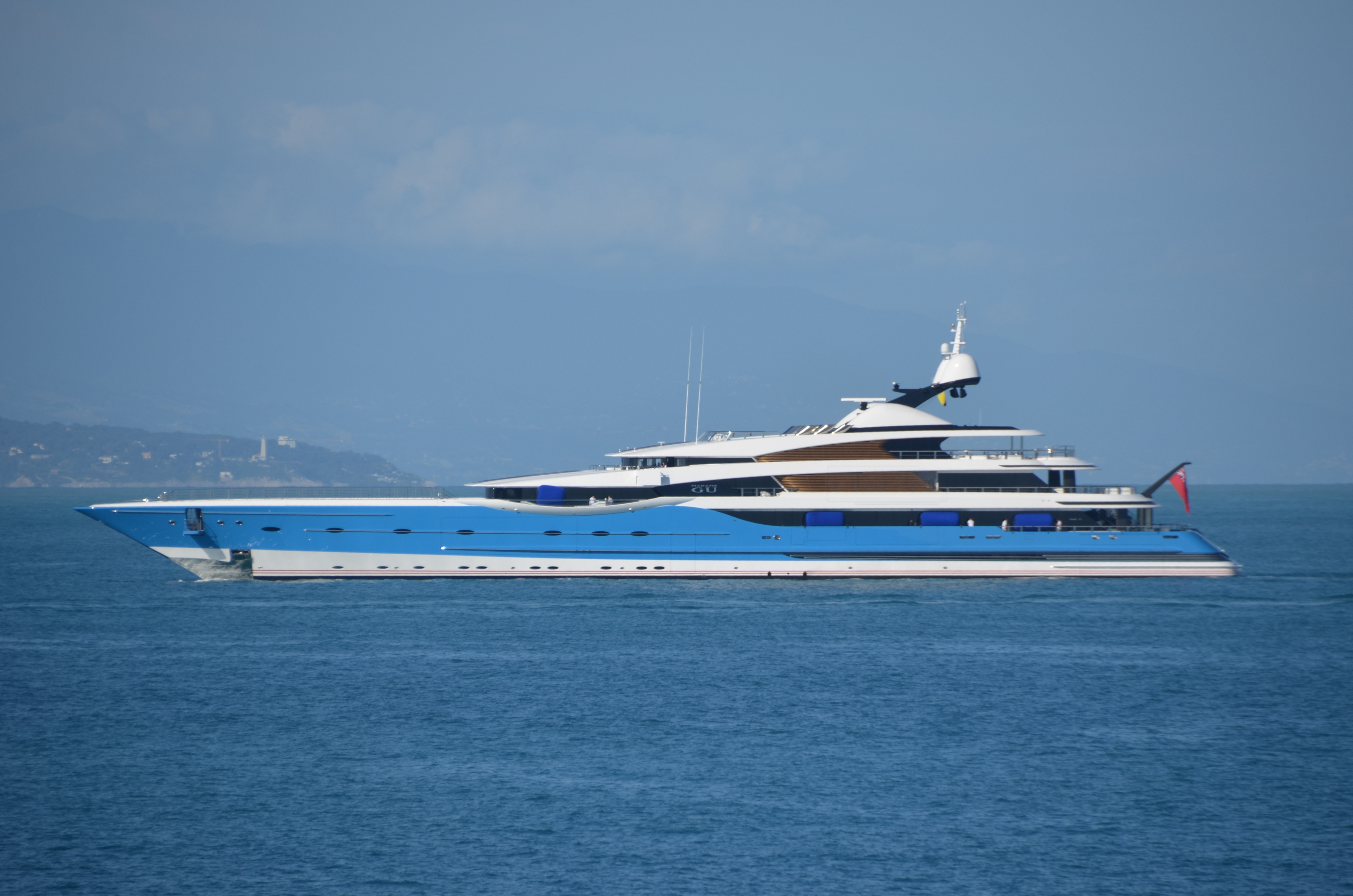 Madame Gu am 21. Mai 2013 vor Antibes